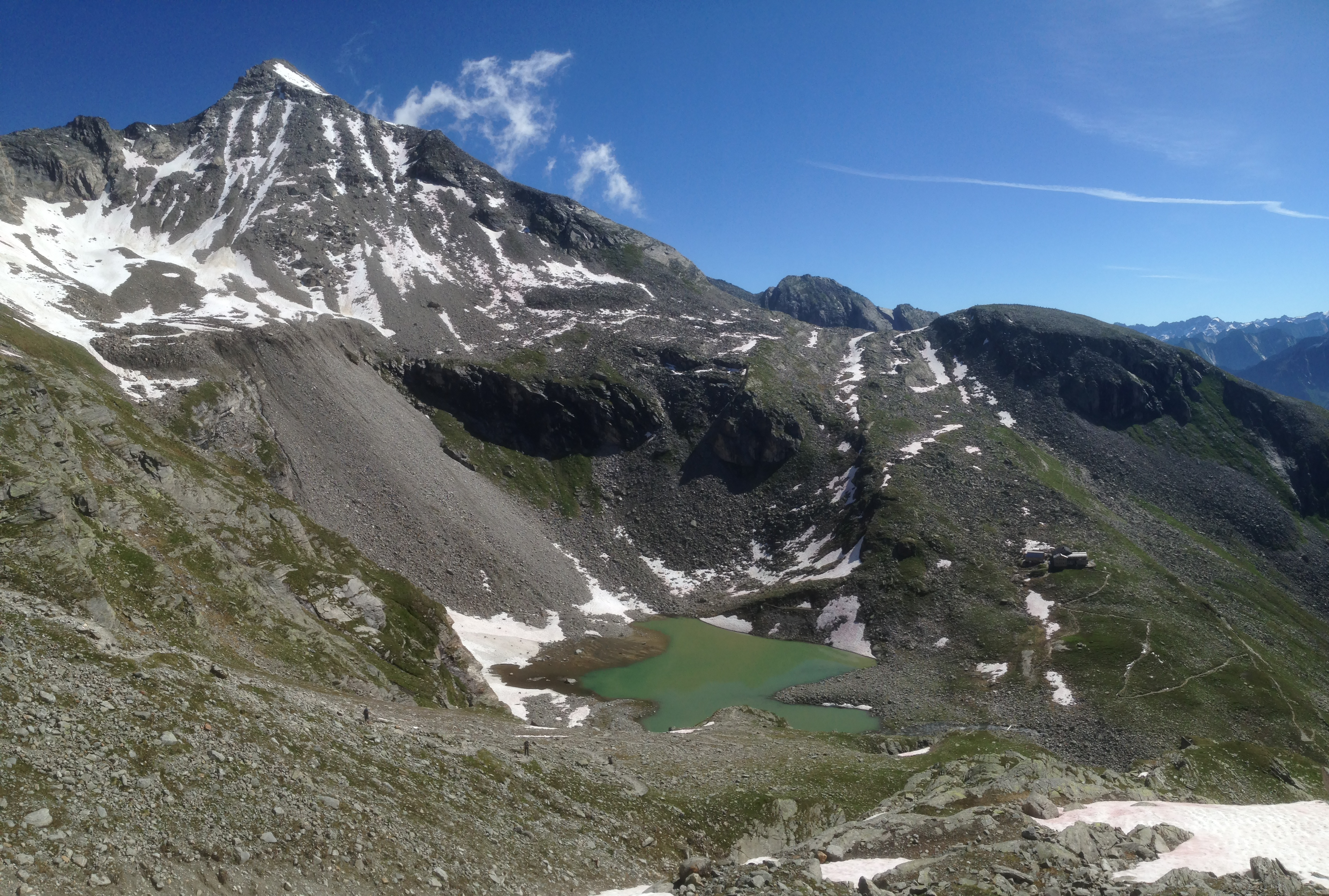 Hoher Riffler (Zillertaler Alpen)